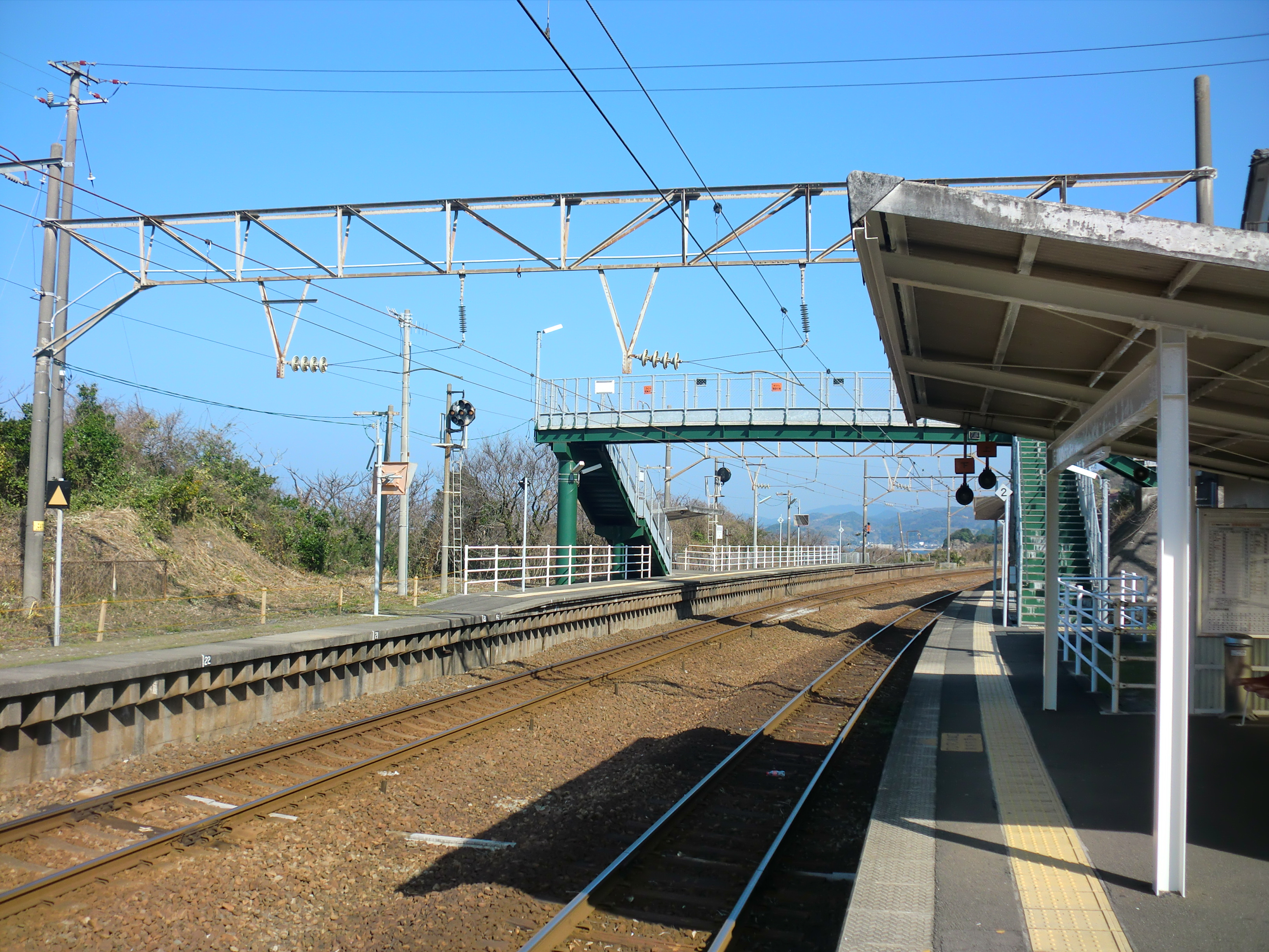 薩摩川内市にある肥薩おれんじ鉄道薩摩高城（さつまたき）駅ホーム